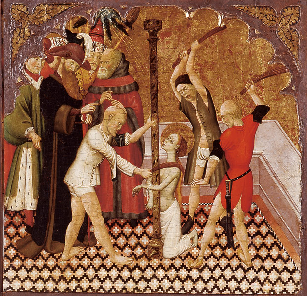 Flagelació de Santa Eulàlia, per Bernat Martorell. Del Retaule de Santa Eulàlia i Sant Joan, 1427-1437 (Vic, Museu Episcopal de Vic)